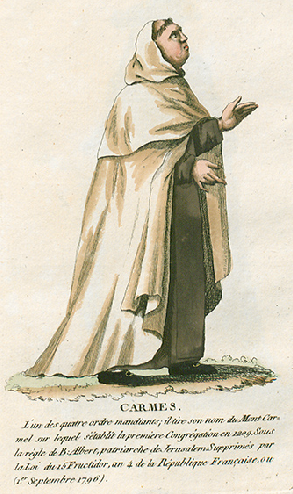 Collection de costumes de tous les ordres monastiques, supprimés à differentes époques, dans la ci-devant Belgique, Bruxelles, Philippe Joseph Maillart et sœur, 1811